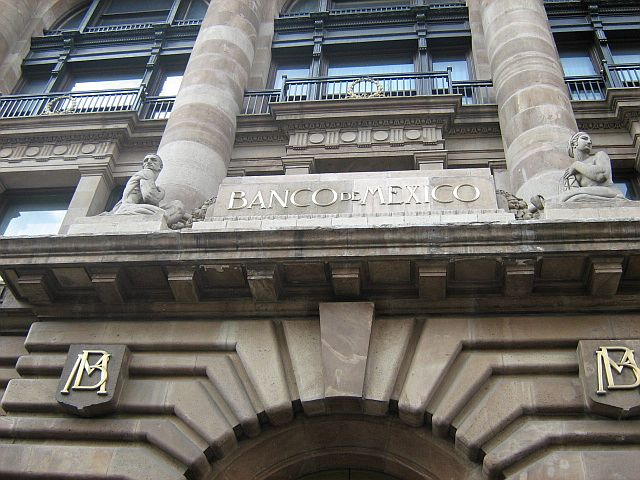 Detalle de la fachada del edificio del Banco de México en el D. F.